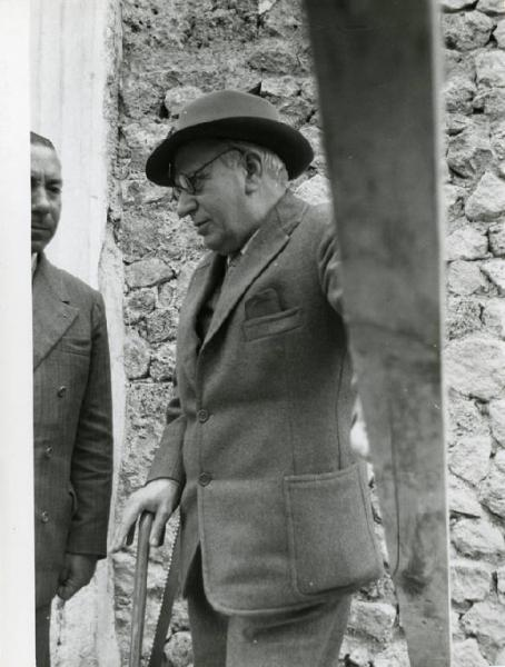 Amedeo Maiuri sopralluogo agli scavi di Pompei